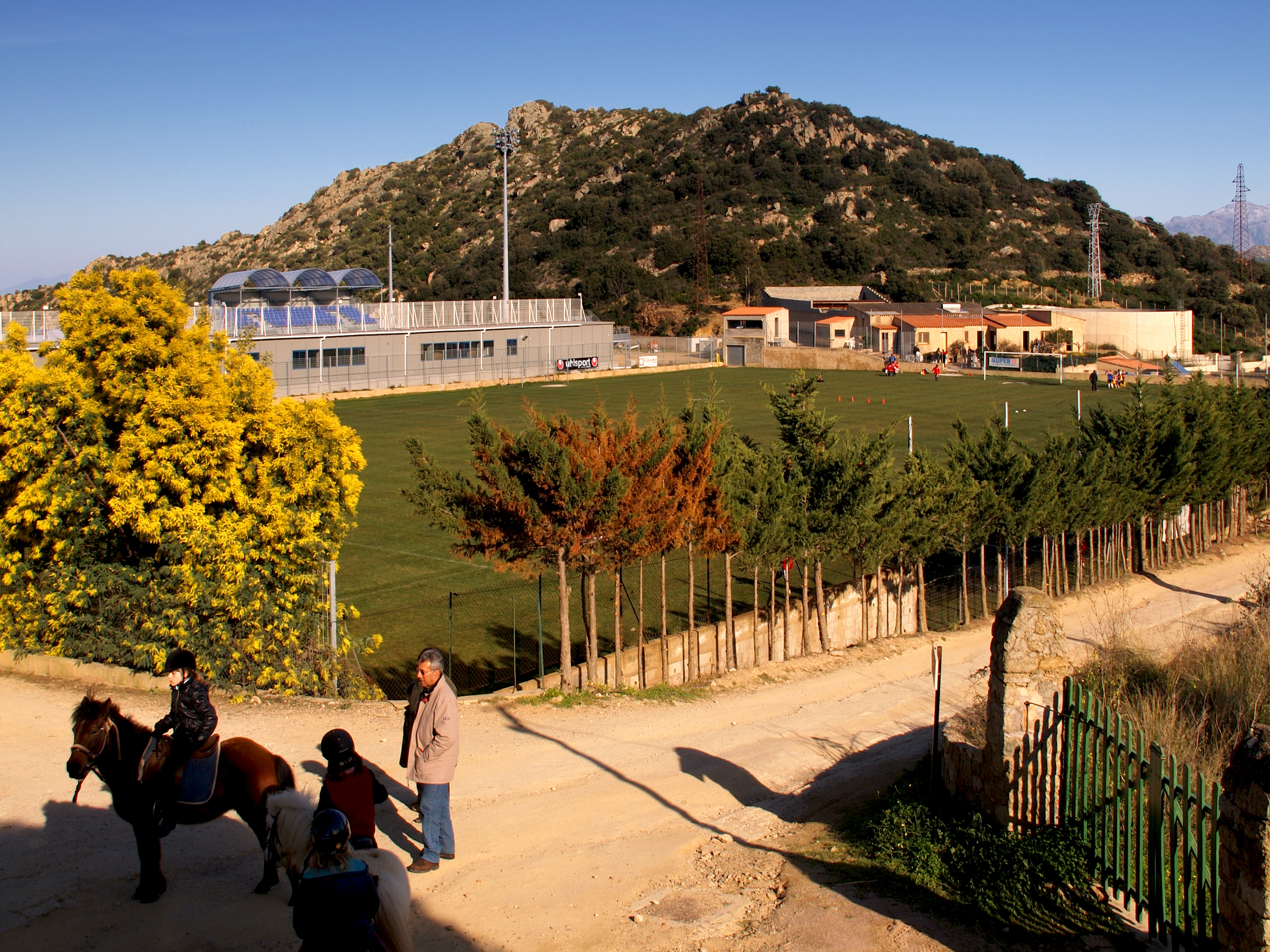 Monticello (Corsica) - Stade au Complexe sportif San Francesco